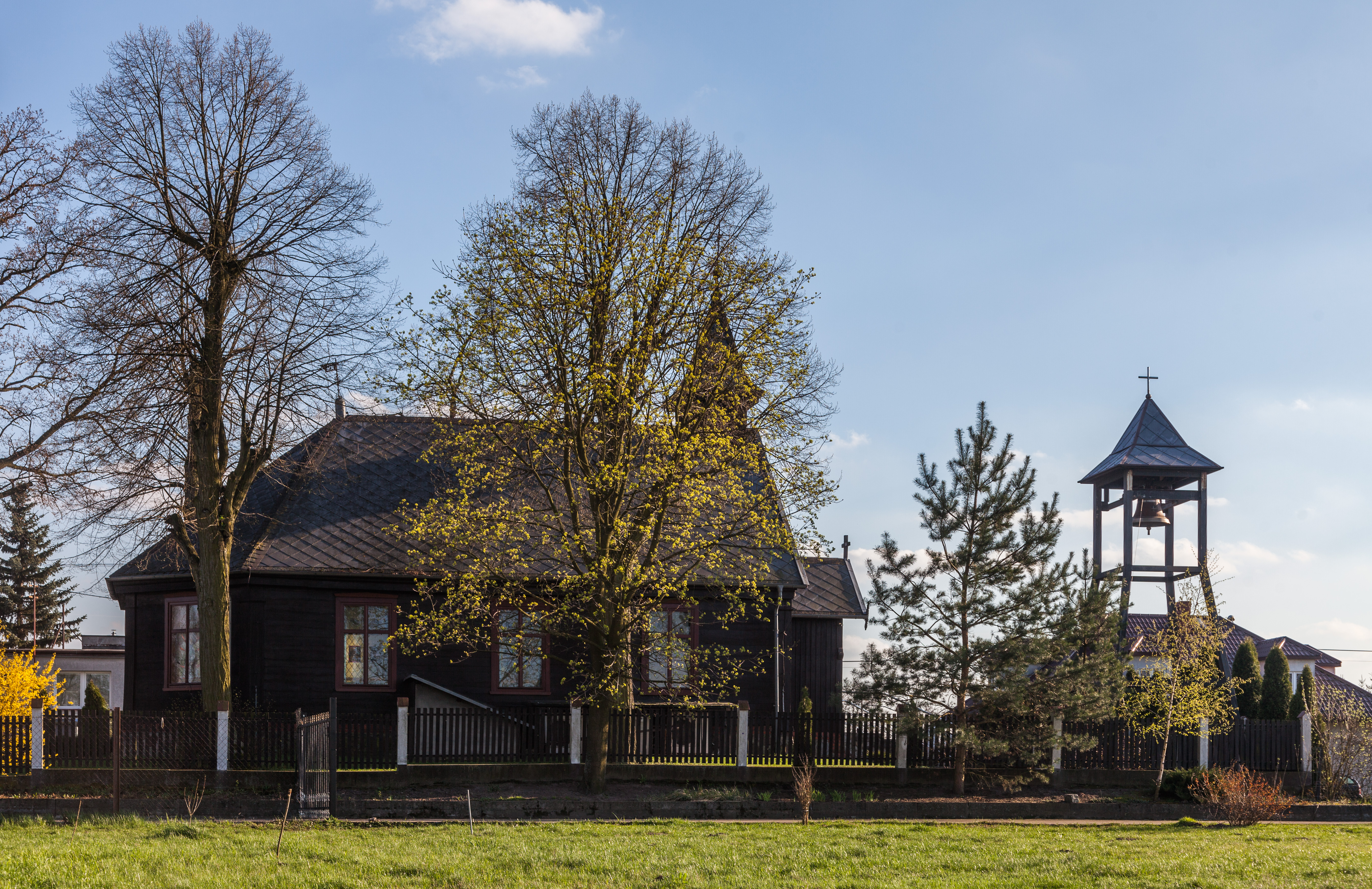 Dawny zbór mennonitów w Małej Nieszawce, zbudowany w 1890 r., obecnie kościół katolicki.